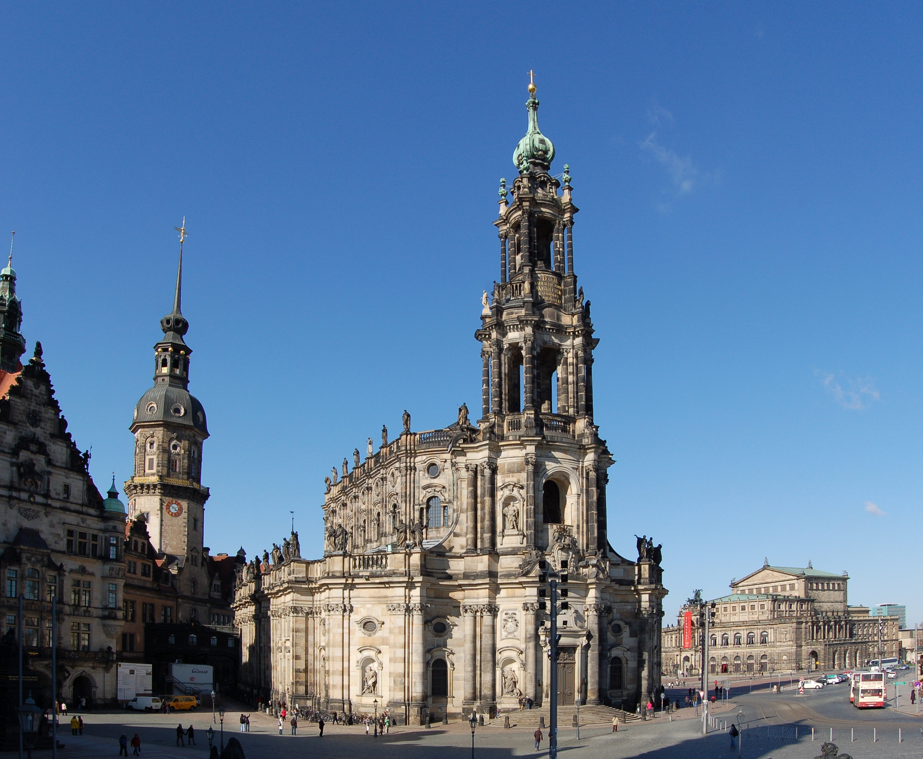 Die denkmalgeschützte Katholische Hofkirche in Dresden.